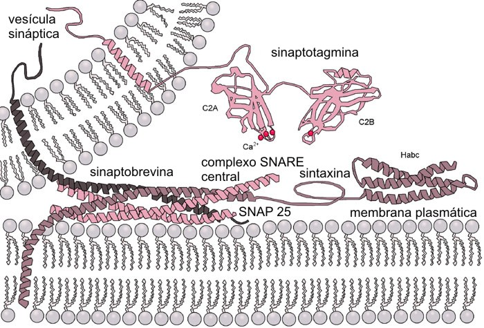 Actuación dos SNARE na fusión de membranas